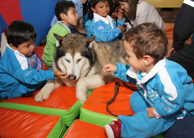 Durante los 20 minutos que dura la sesión los niños realizan actividades junto a los perros ‘coterapeutas’.